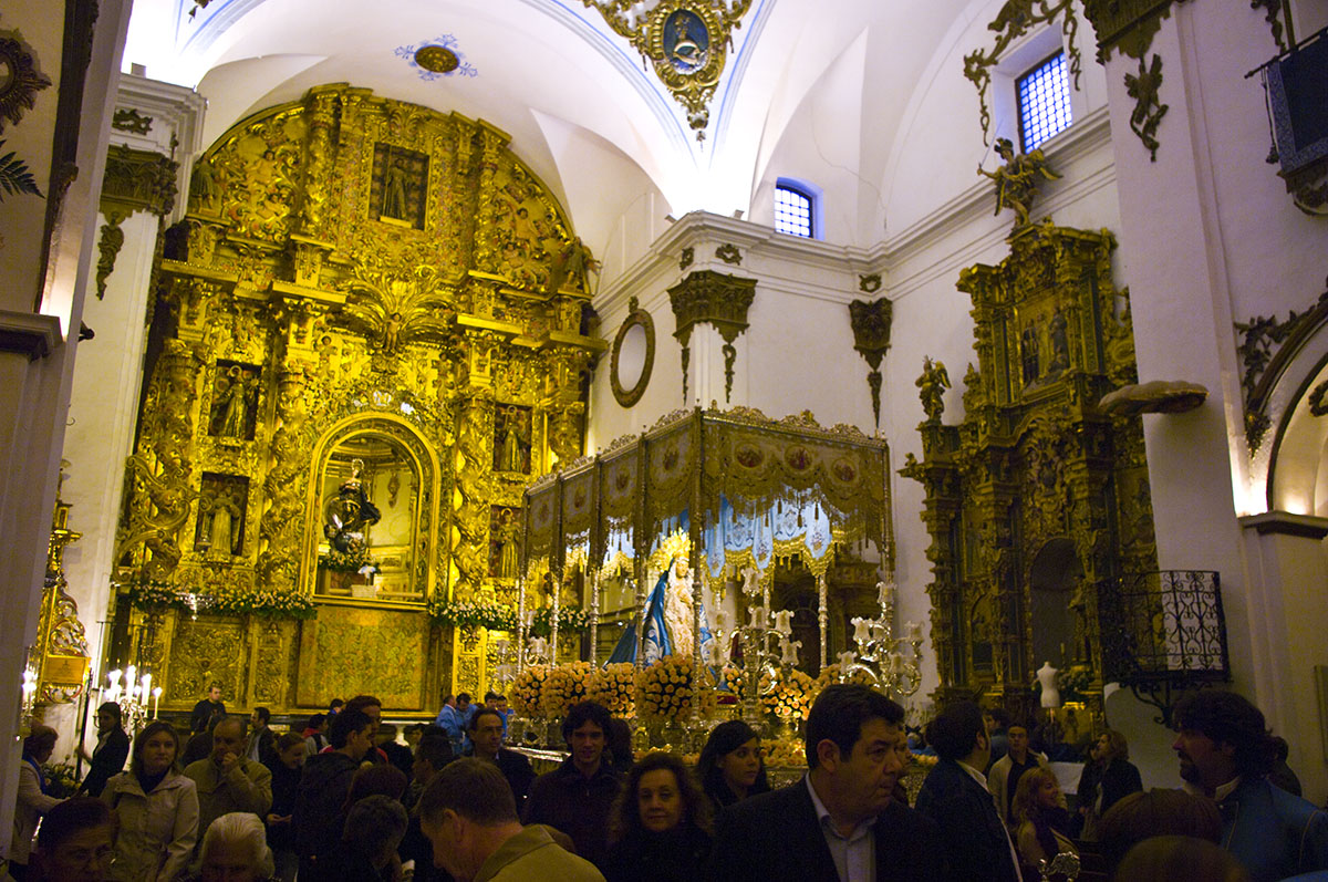 Iglesia de San Francisco de Lorca (Murcia) en Viernes Santo.